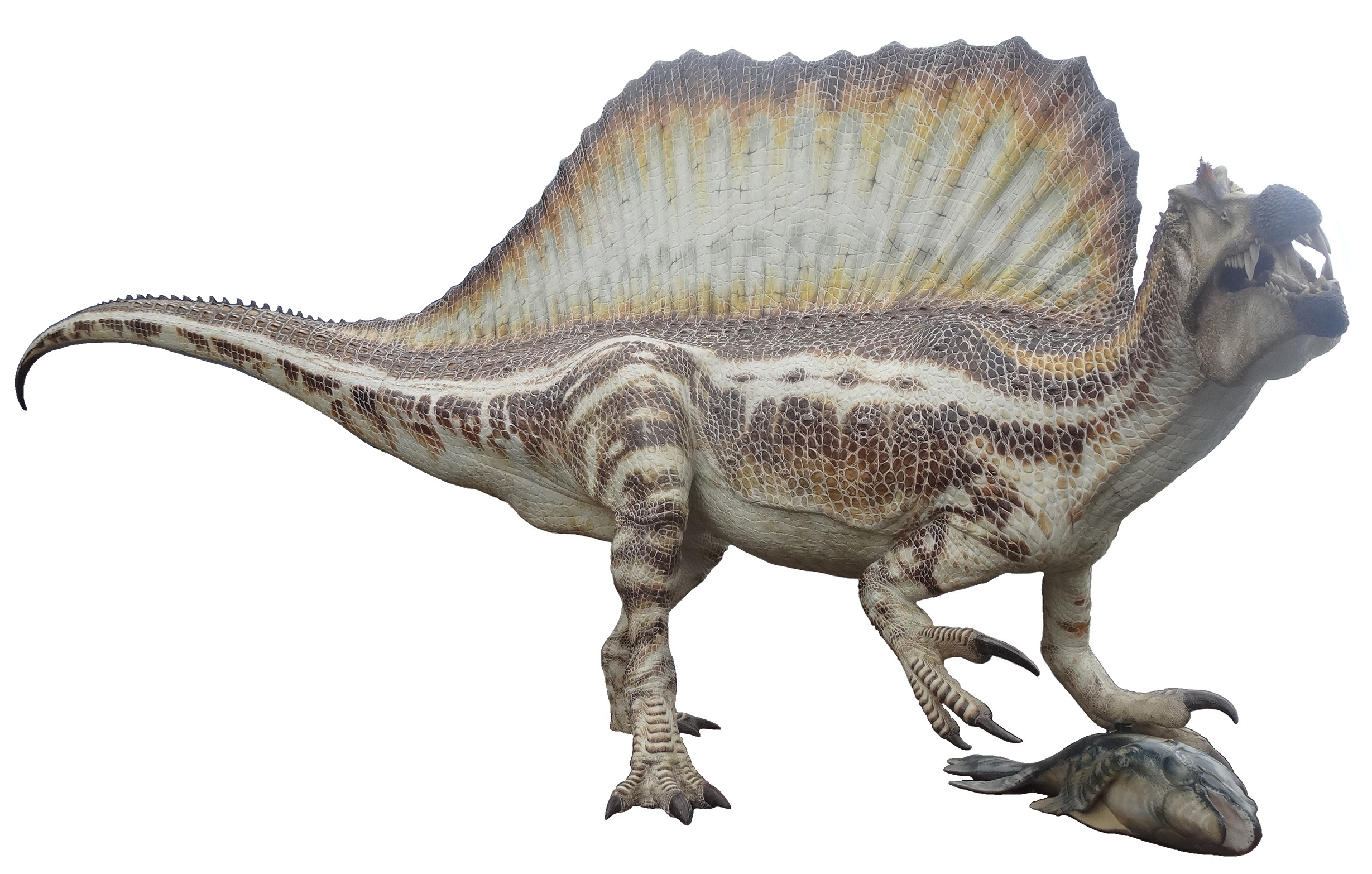 Spinosaurus - Museu Blau - Octubre 2016